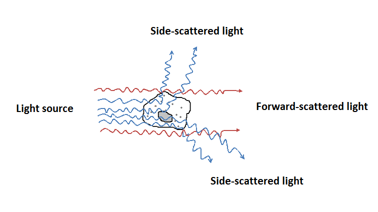 Lysbrytende egenskaper til en celle